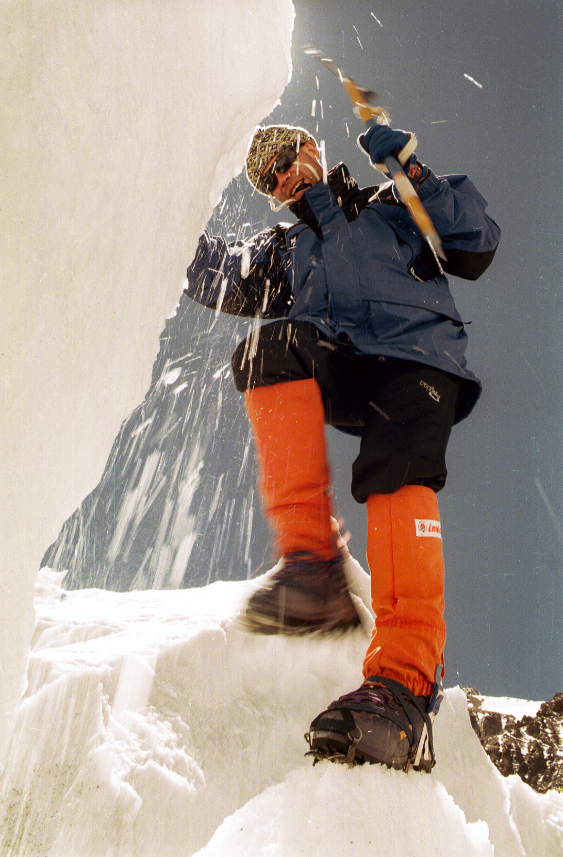 Üllar Põld.